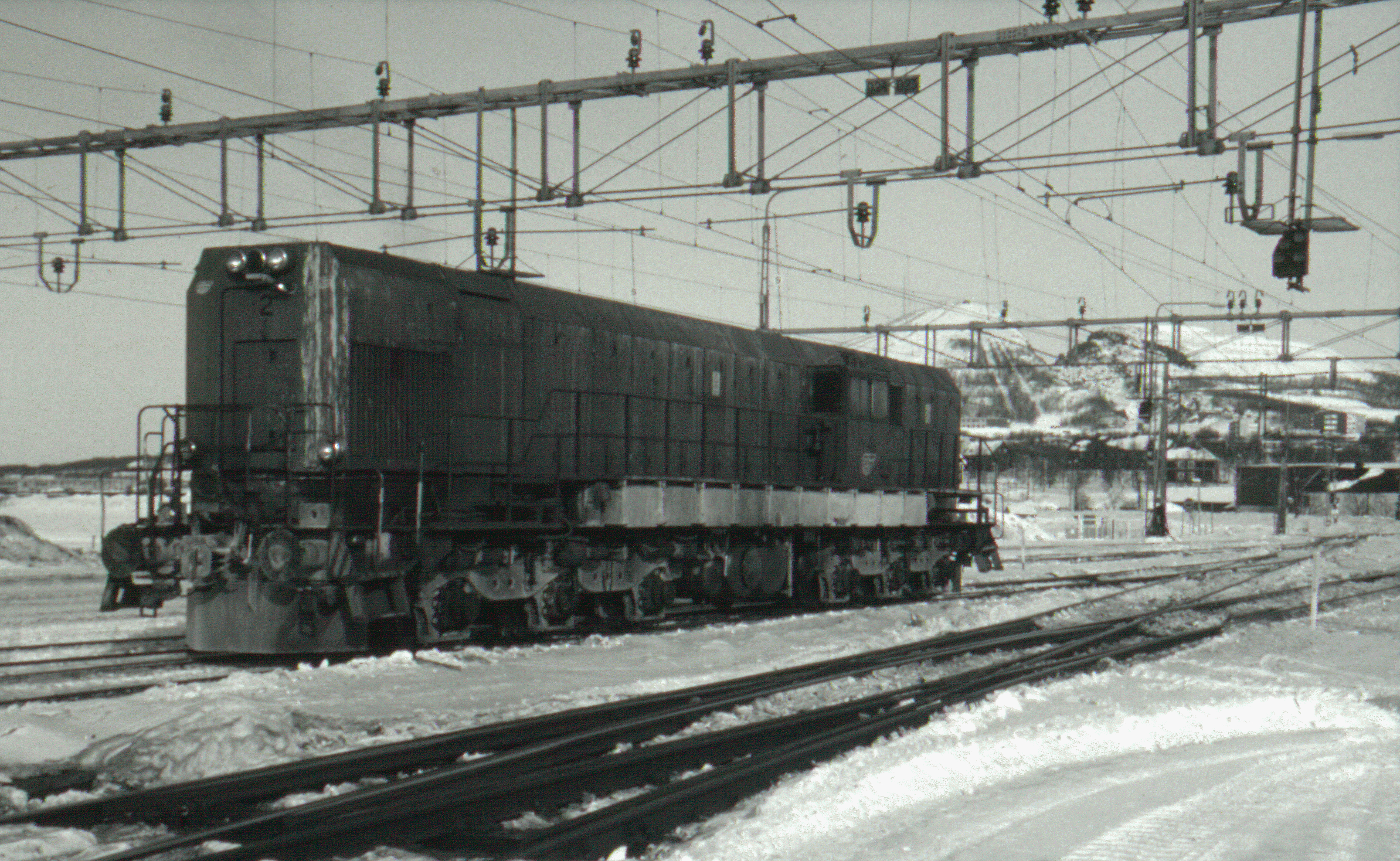 Malmbanan: T46-2 jobbar som växellok på Kiruna sjöbangården